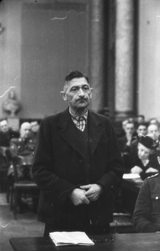 Volksgerichtshof, Ferdinand Freiherrr von Lüninck Berlin, Volksgerichtshof, Prozesse nach dem 20. Juli 1944; Ferdinand Freiherr von Lüninck, Prozess am 13.11.1944, am 14.11.1944 in Berlin-Plötzensee hingerichtet